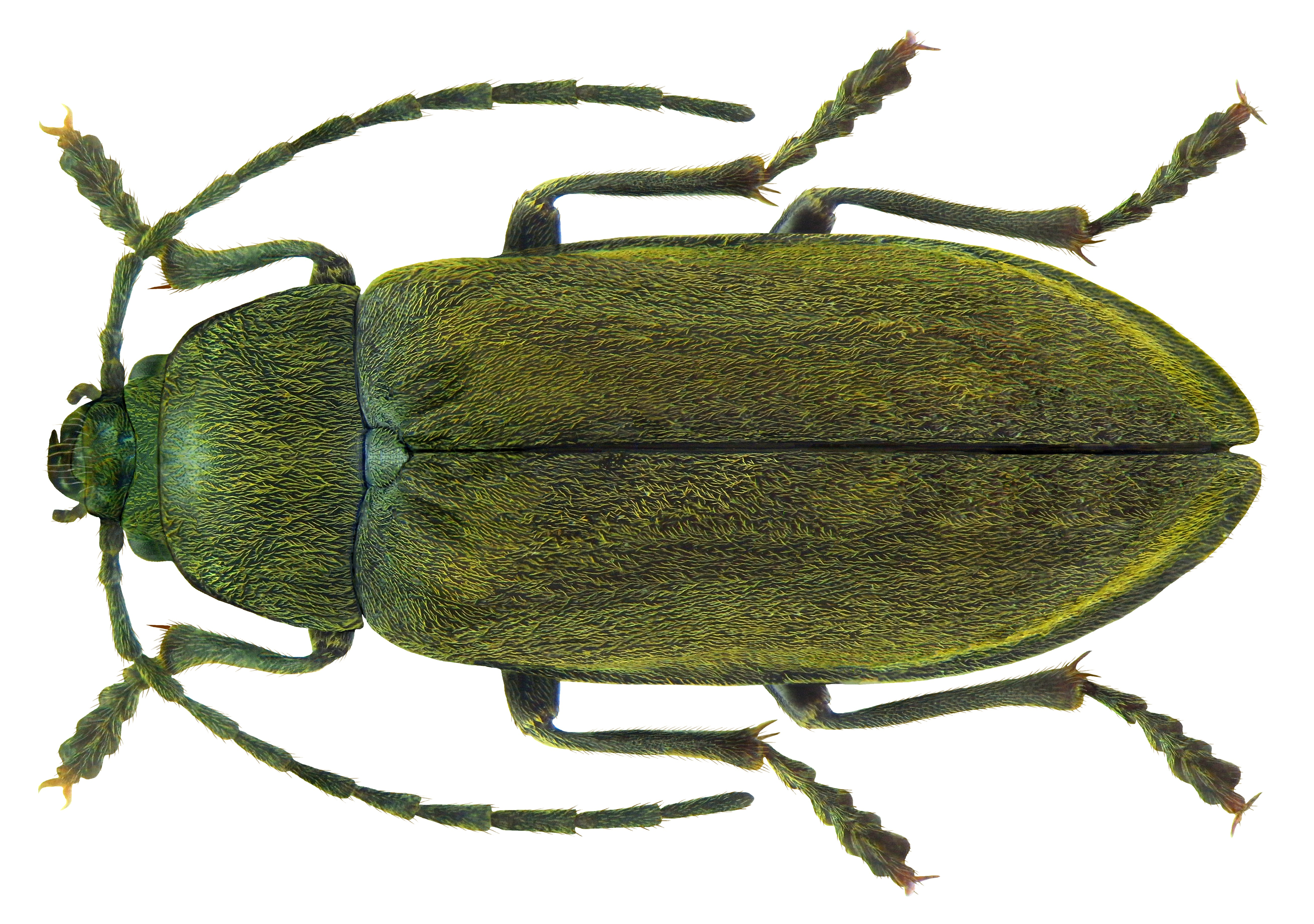 Familie: Dascillidae Groesse: 9-11,5 mm Verbreitung: Europa Oekologie: auf Gebüsch Fundort: Italien, Südtirol, Brixen, Vahrner See leg.det. U.Schmidt, 1973 Photo: U.Schmidt, 2011